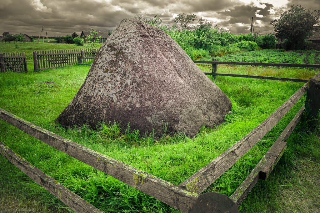 Варацішын крыж